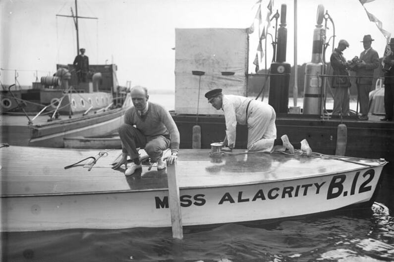 Die grossen Internationalen Motorbootrennen auf dem Templiner See in Potsdam bei Berlin! Major Segrave (sitzend) untersucht vor der Rennfahrt sein Boot "Miss Alacrity" auf dem Templiner See in Potsdam.